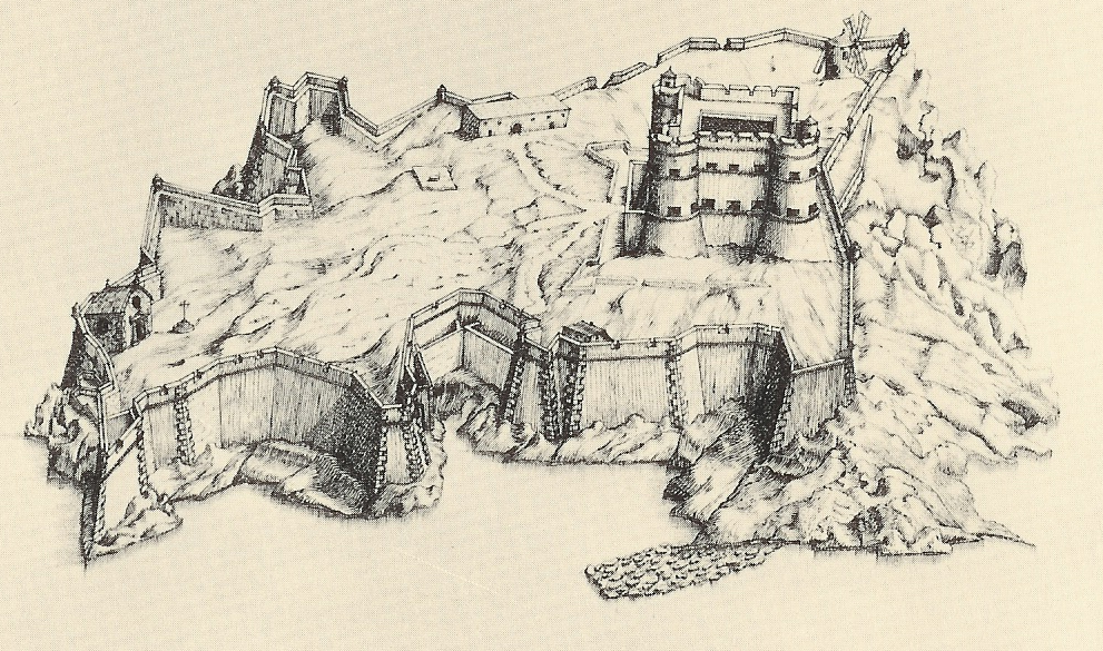 Dessin à la plume de F. Blondel en fr:1641 du Château d'If, au large de Marseille. Bibliothèque Nationale, Cabinet des Estampes.